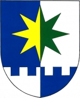 Březina (RO), znak. V modro-stříbrně polceném štítě nad cimbuřovou patou opačných barev zlato-zeleně polcená osmihrotá hvězda.